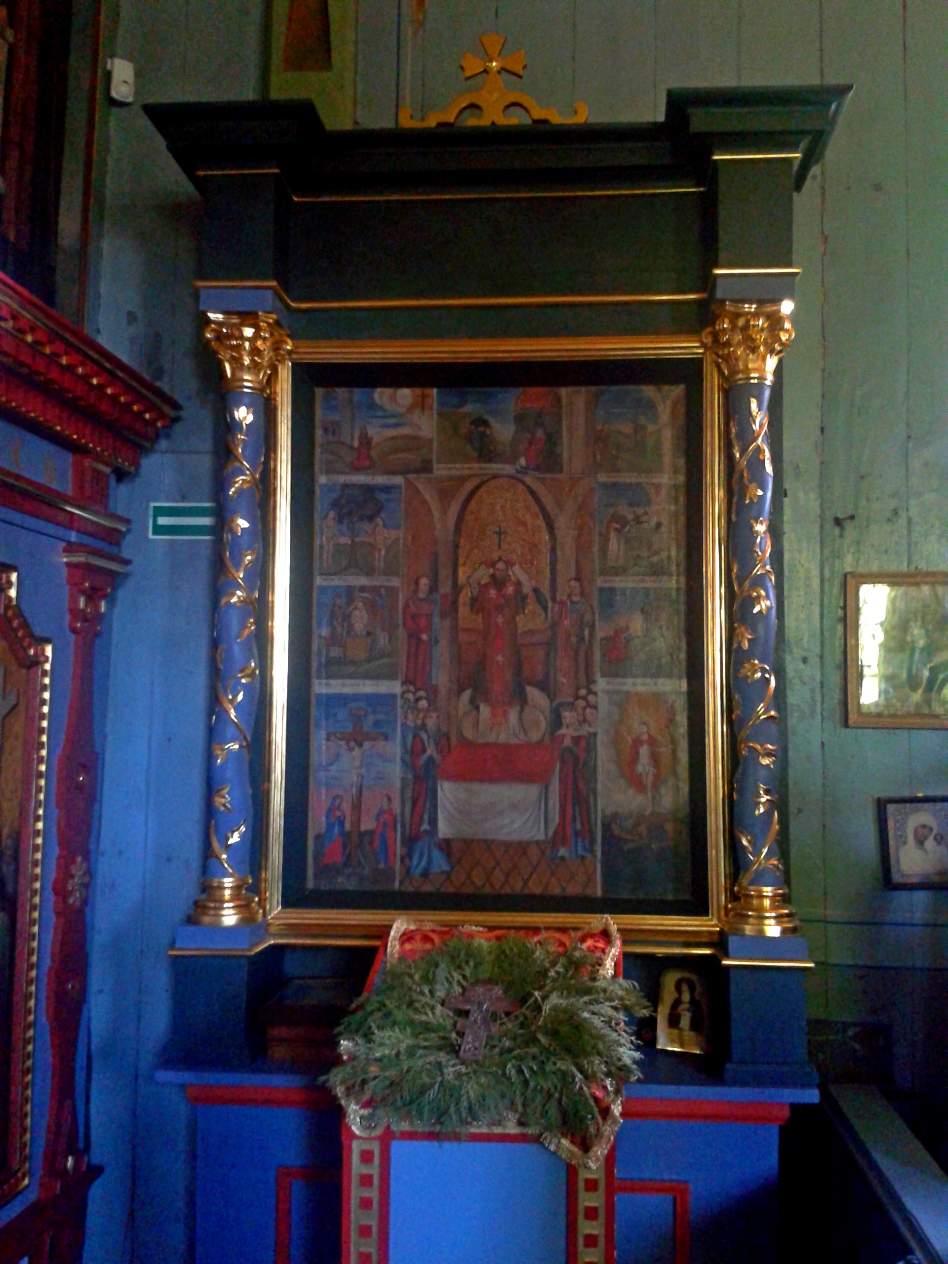 Ikona Podwyższenia Krzyża Pańskiego z klejmami w cerkwi w Horostycie